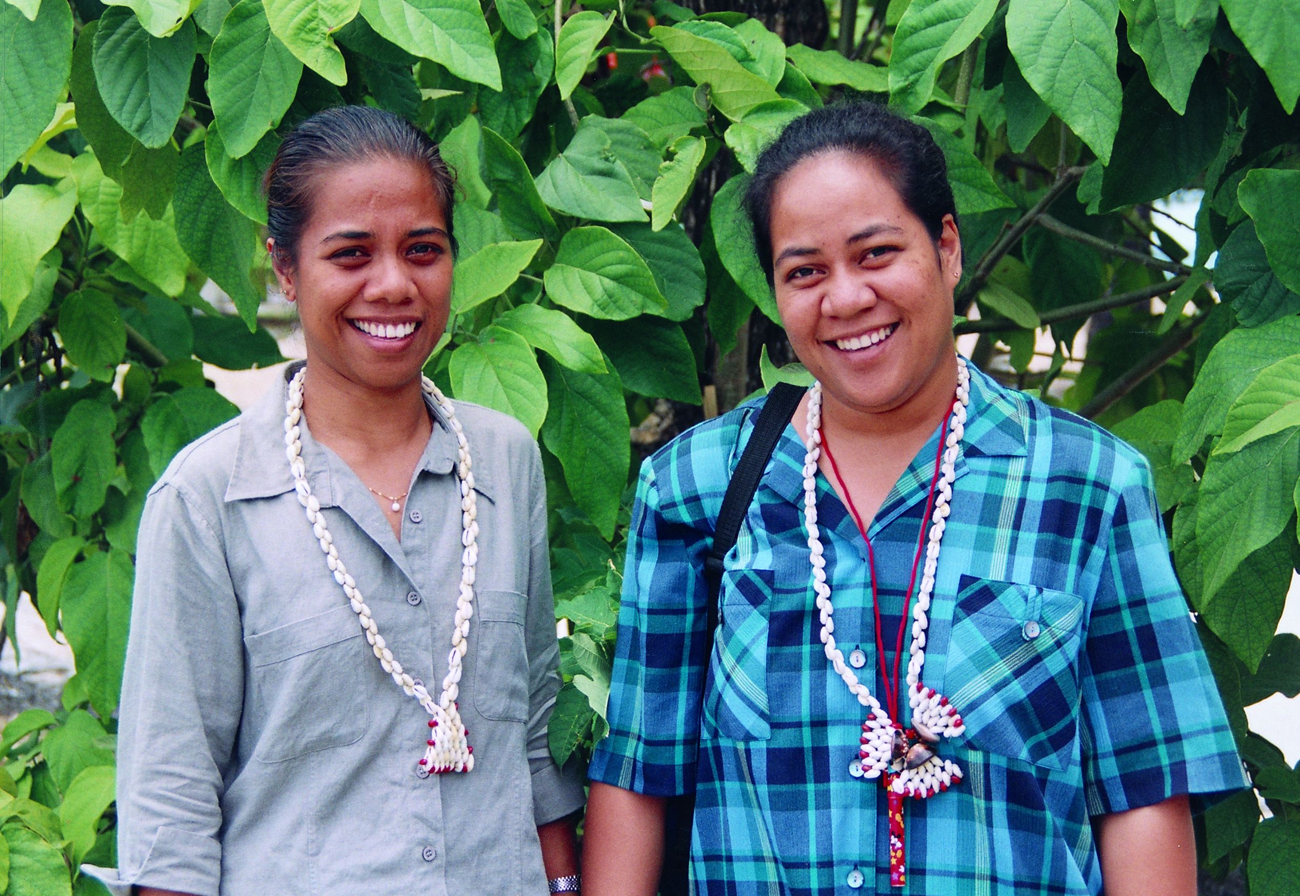 Tuvalu's first female doctors. Tuvalu 2008.